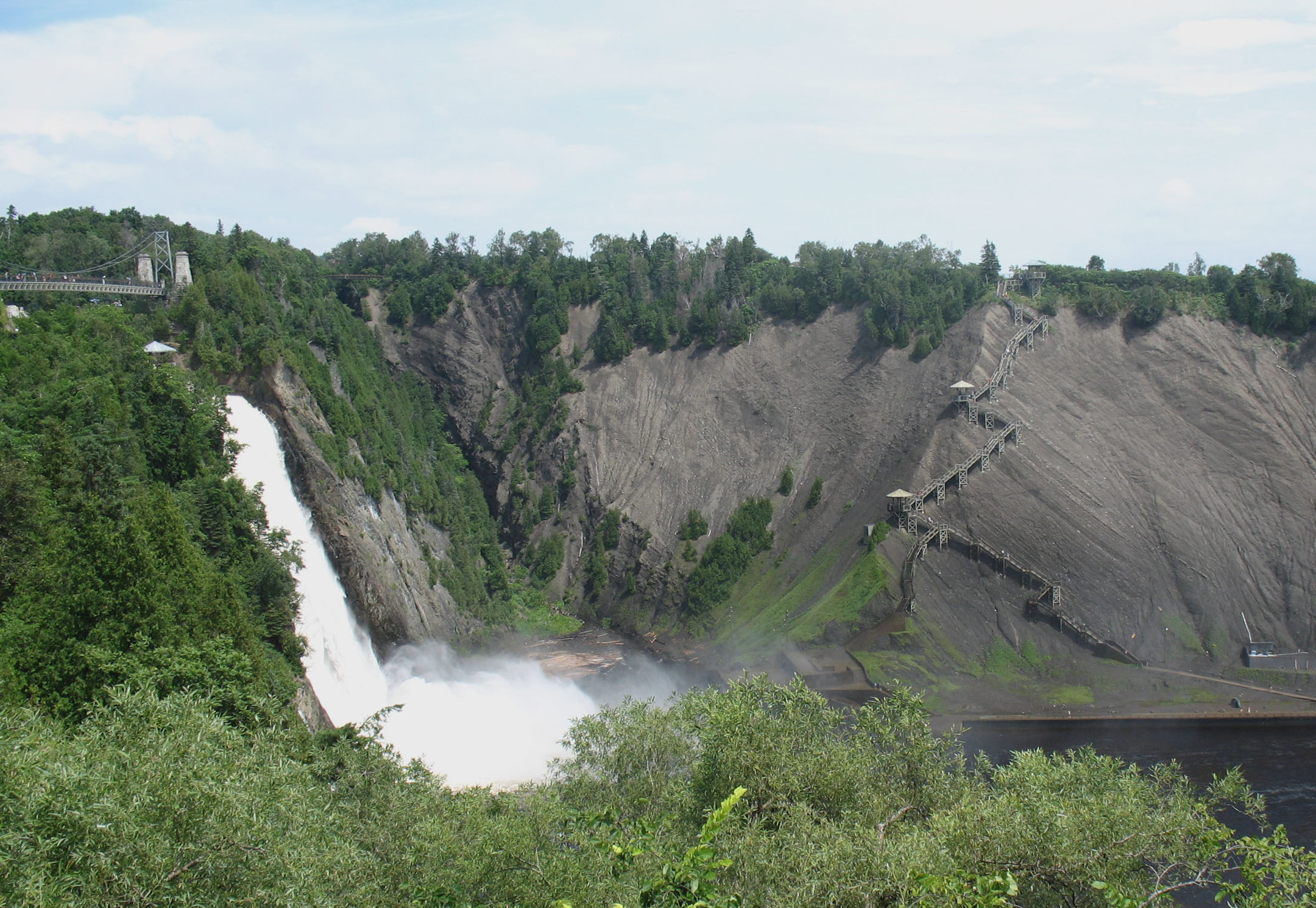 Parc de la Chute-Montmorency, Québec, Canada